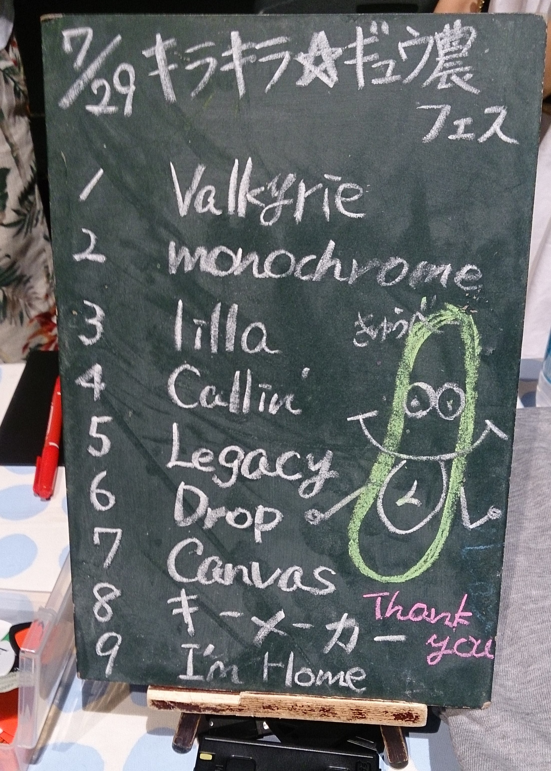 amiinAセトリボード(20170729(1))